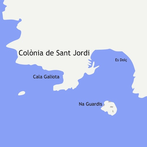 Jaciment arqueològic de l'illot de na Guardis, a prop de la Colònia de Sant Jordi, Mallorca This map may be incomplete, and may contain errors. Don't rely solely on it for navigation.